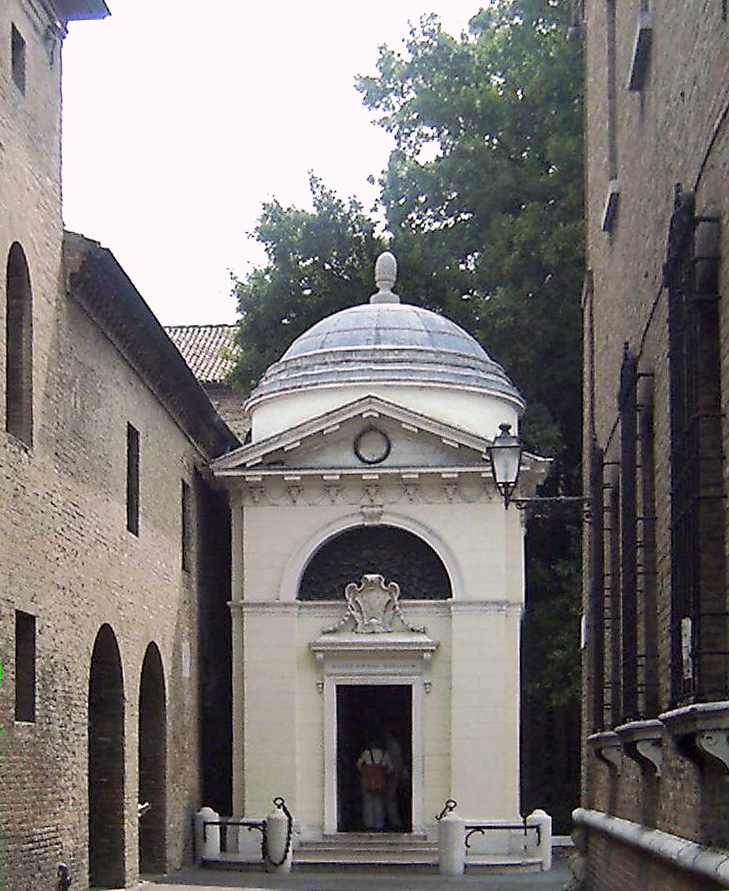 Tomba di Dante